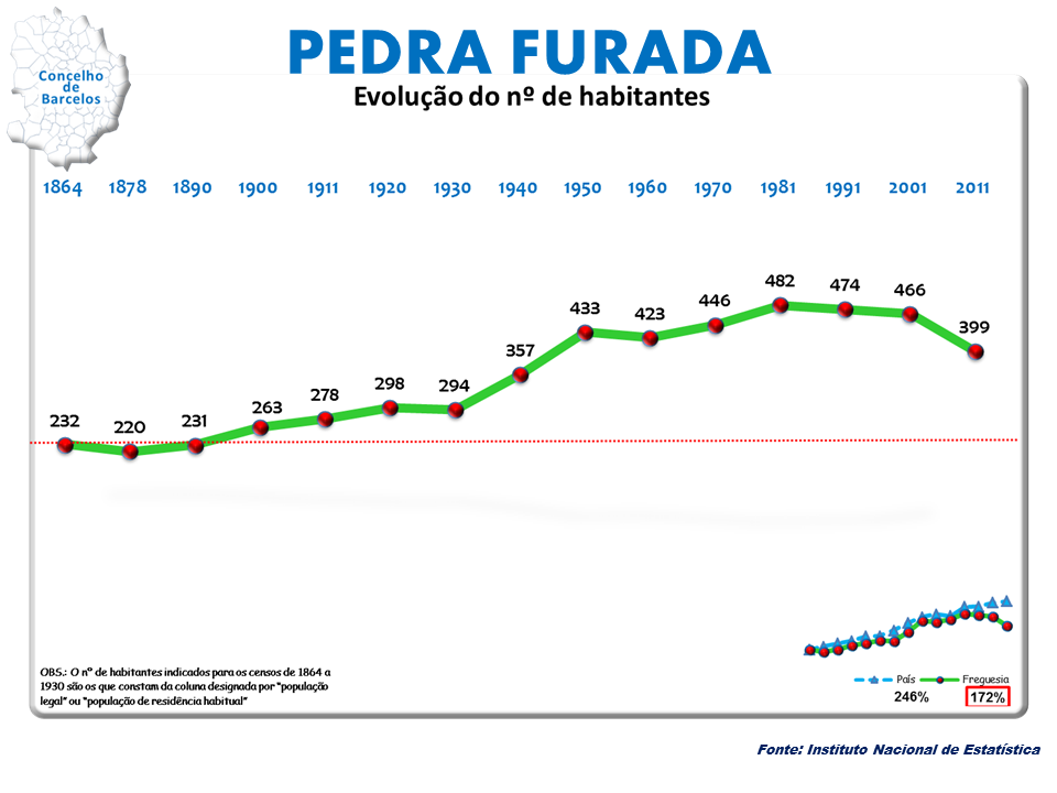 Censo 1864/2011